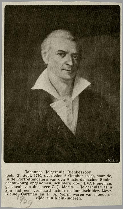 Portrait of Johannes Rienkeszoon Jelgerhuis